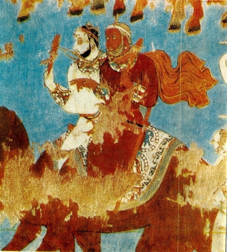 Фрагмент стенной росписи дворца на Афрасиабе. VII-VIIIв